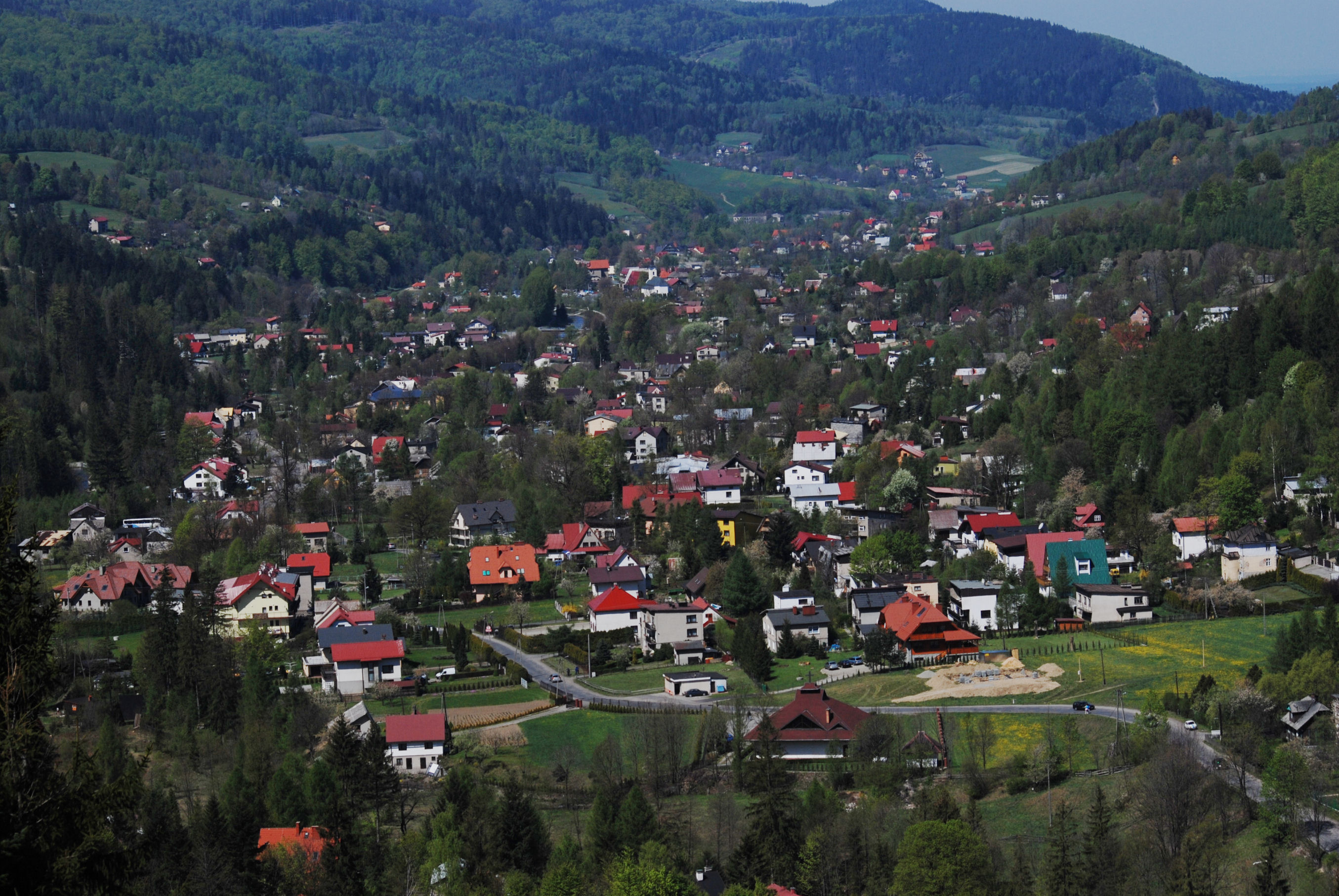 Brenna